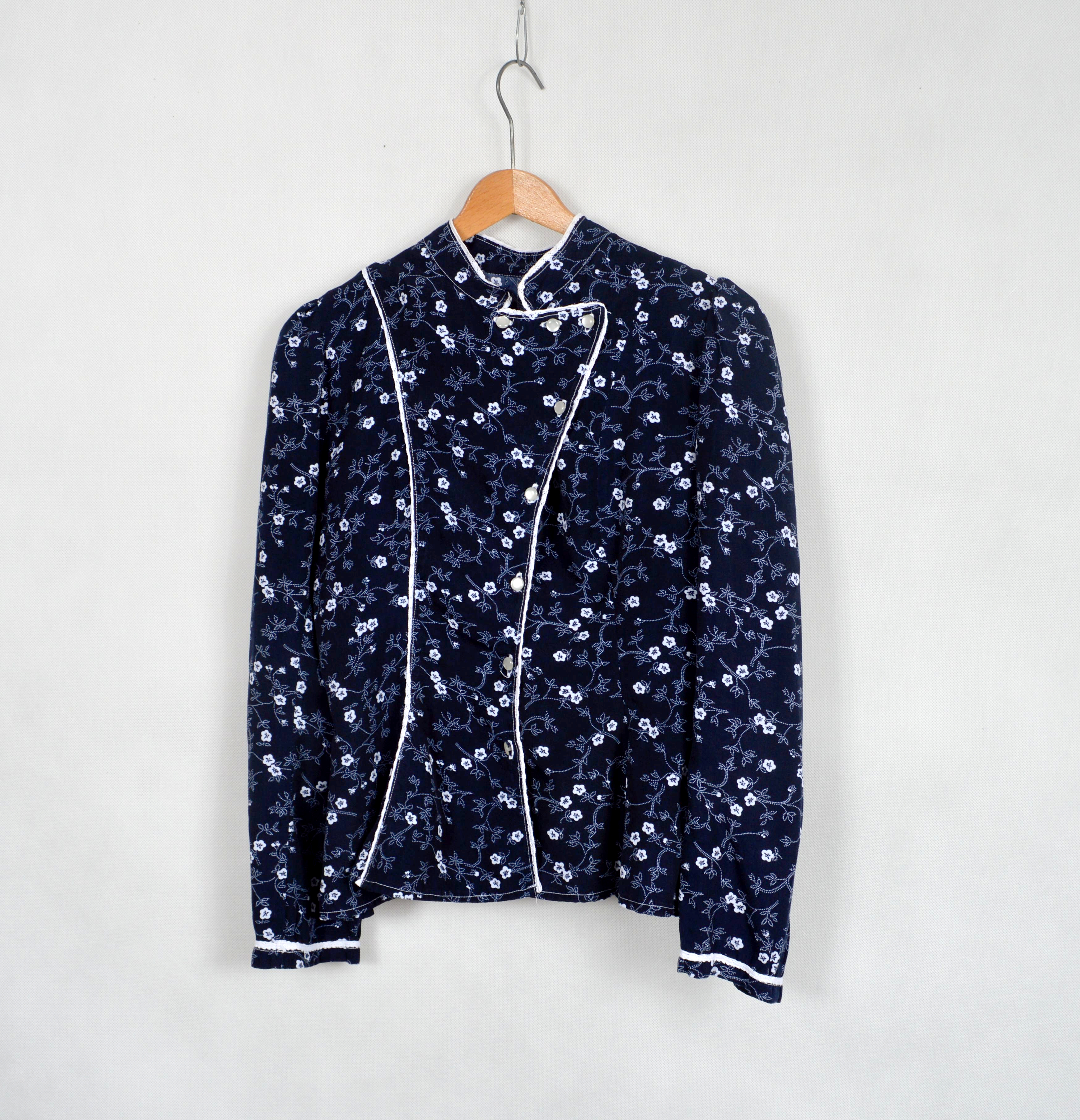 Jakla uszyta współcześnie - pracownia Jadwigi Jurasz, Beskid Żywiecki